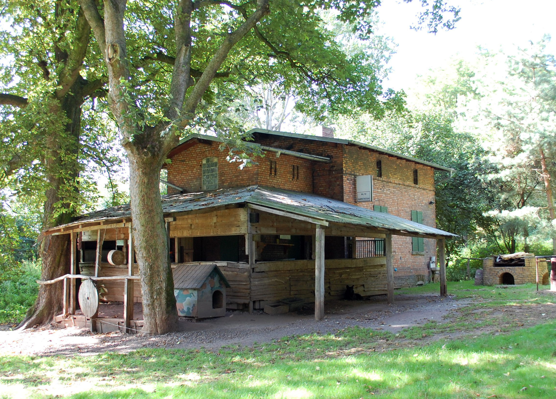 Eilsleben Alte Pumpstation